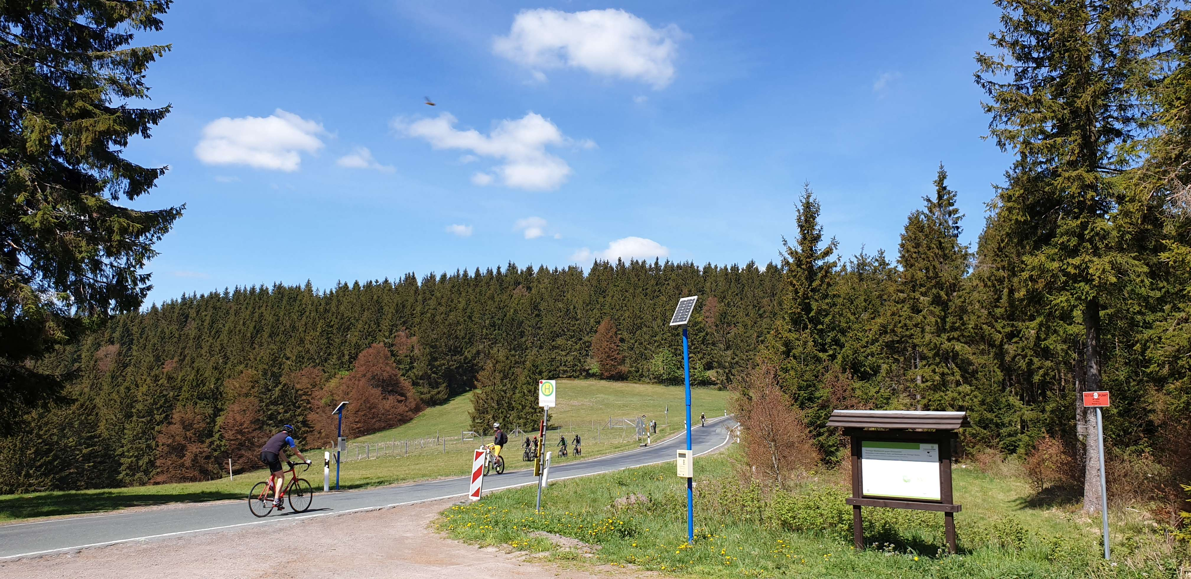 Foto vom Mordfleck in DE-TH, eine Sattelformation am Rennsteig